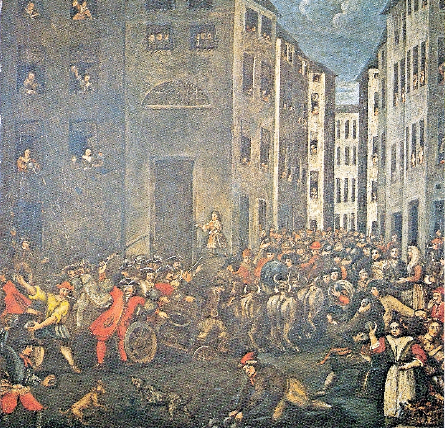 Tela di Giuseppe Comotto raffigurante la rivolta di Genova contro gli Austriaci nel 1746. Al centro è raffigurato Giovanni Battista Perasso detto "il Balilla"